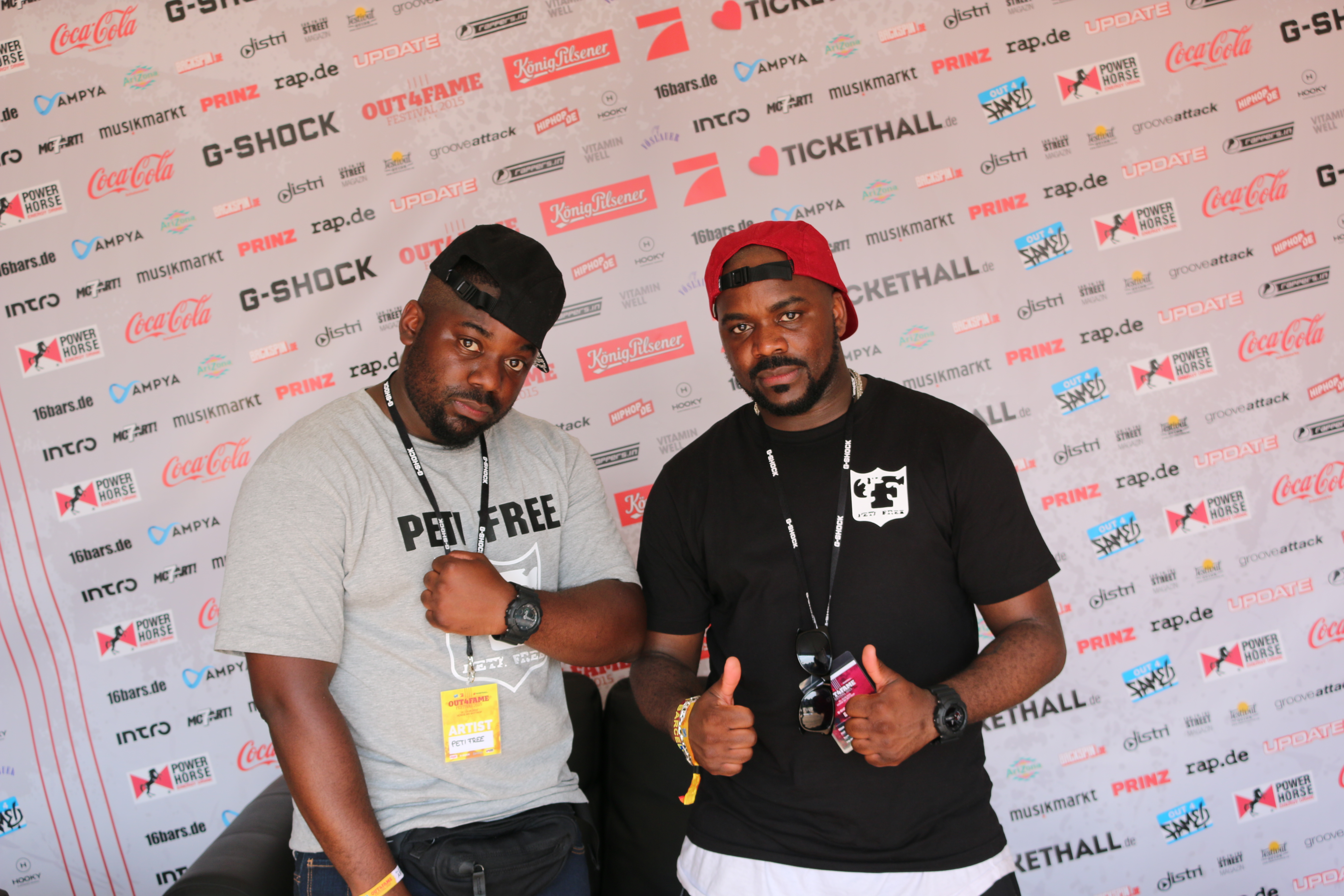 Peti Free